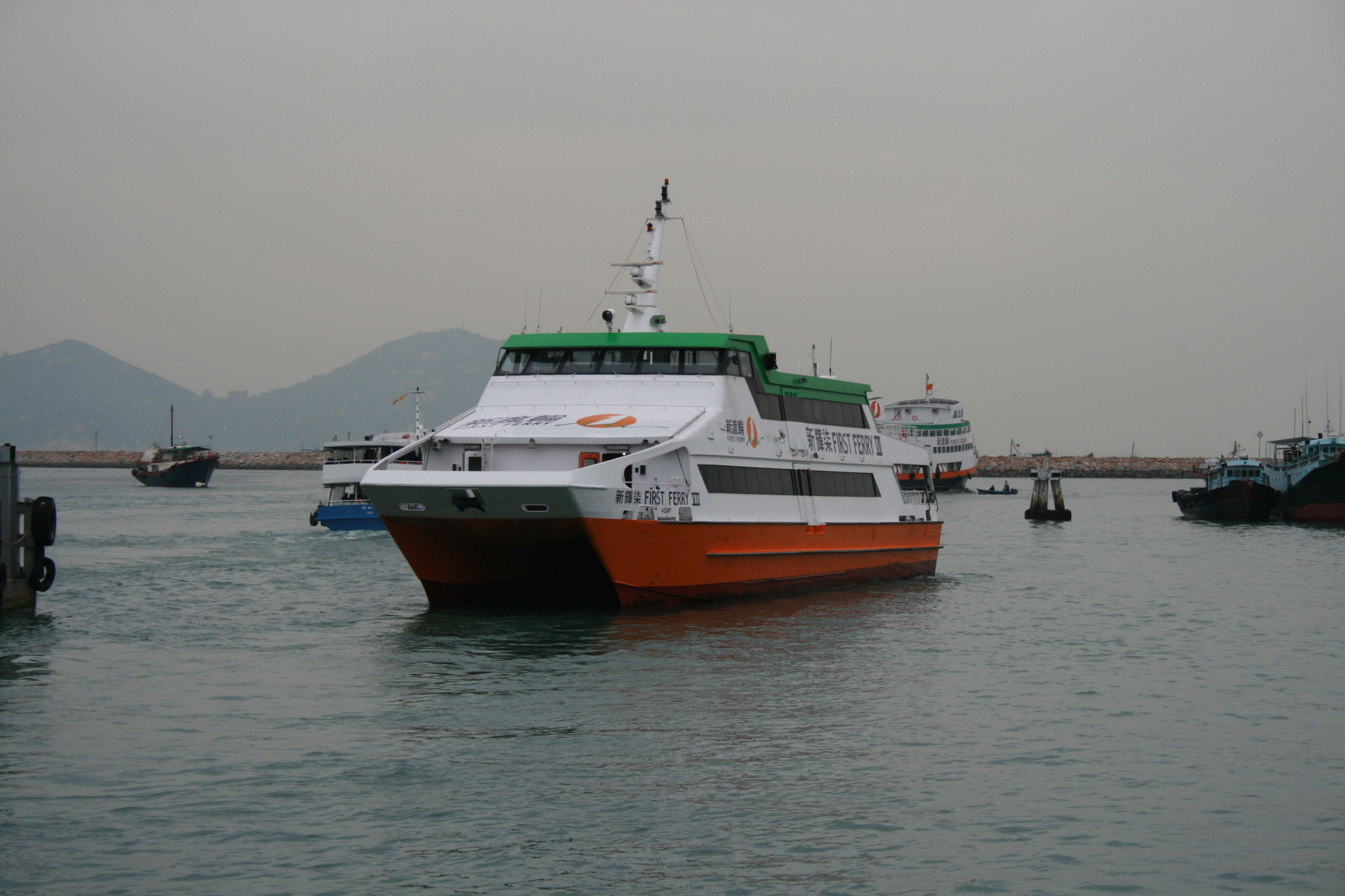 HK Piers First Ferry VII